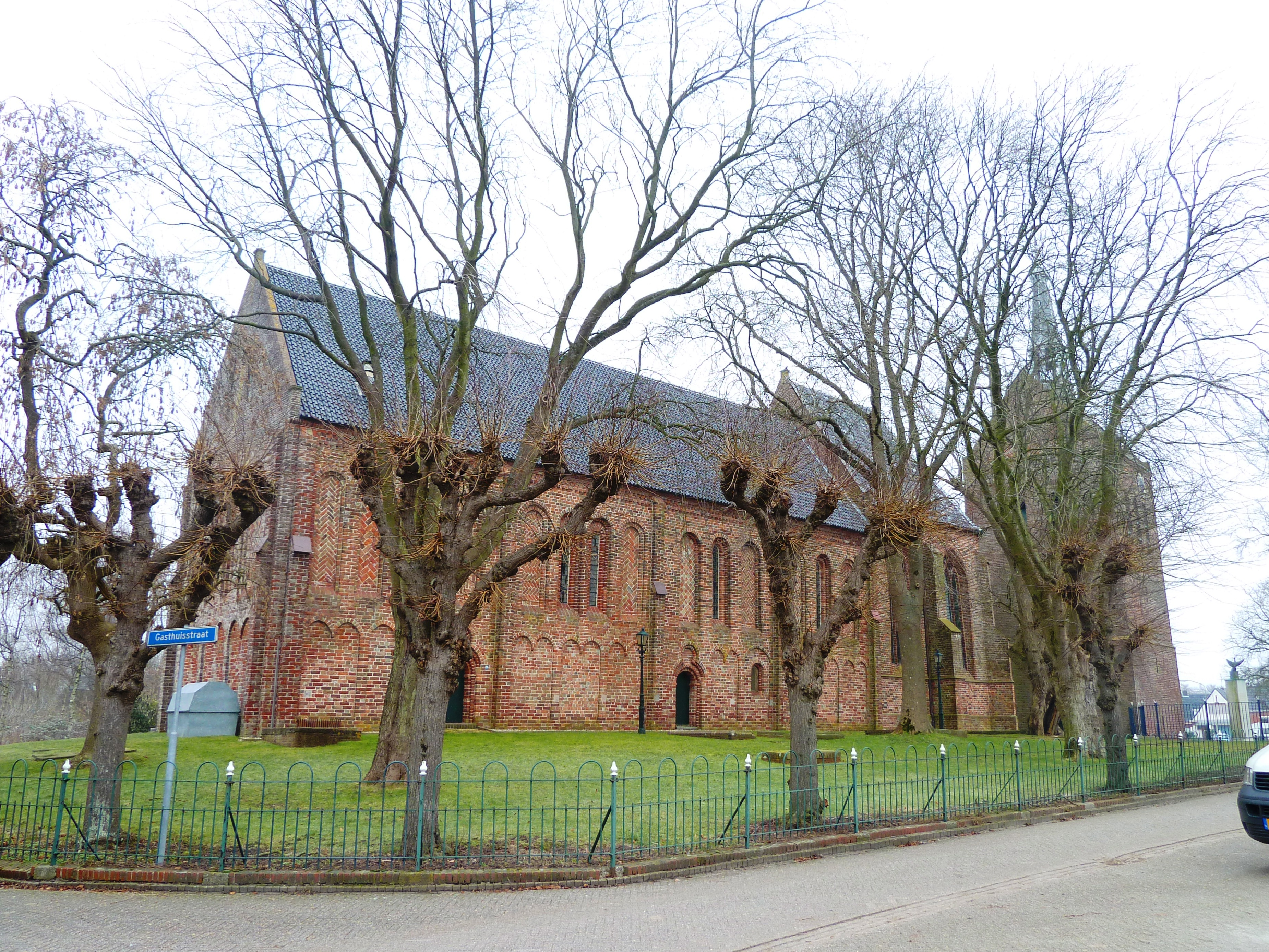 13e eeuwse kerk van 't Zandt met losstaande toren.